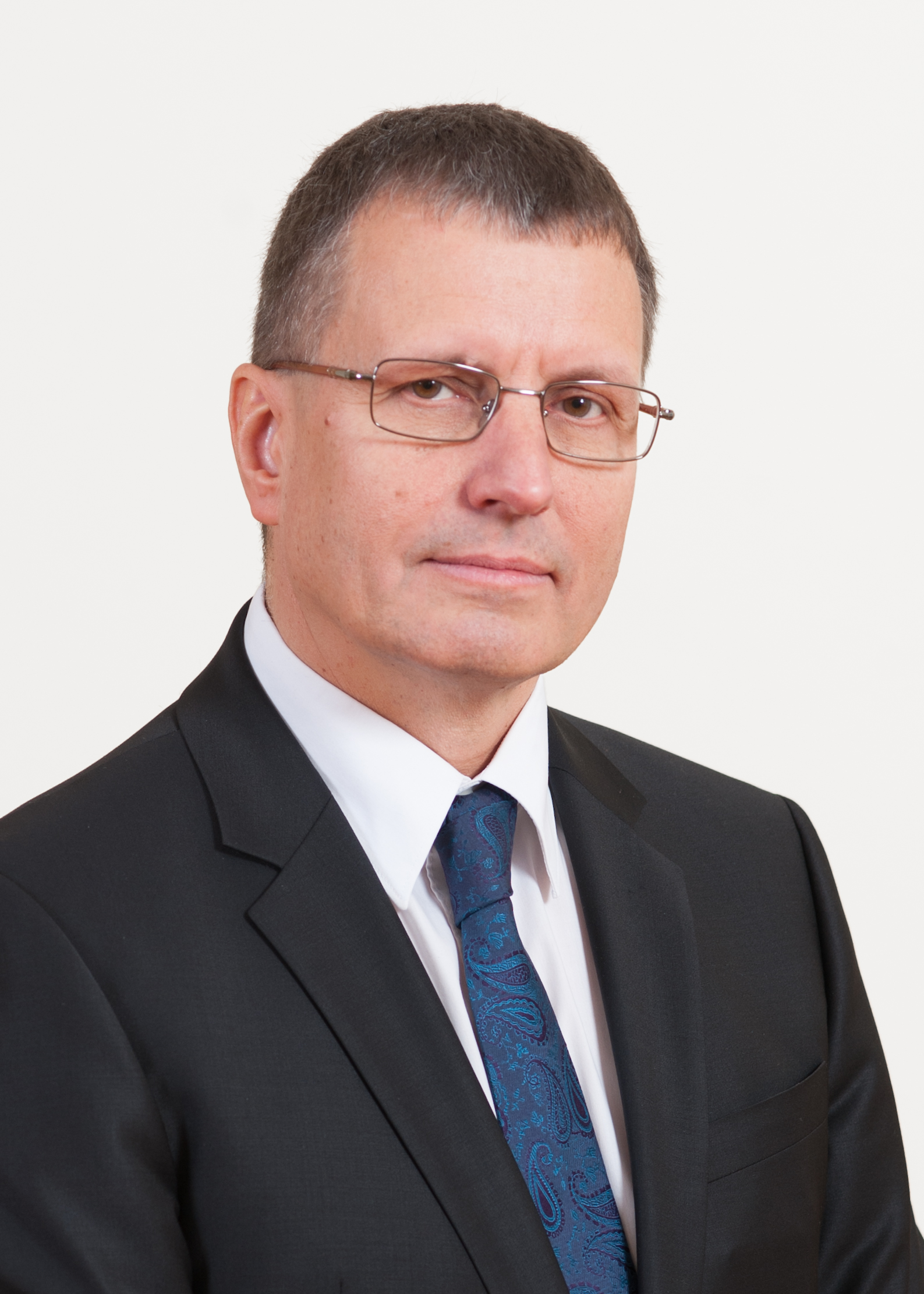 Toomas Vitsut